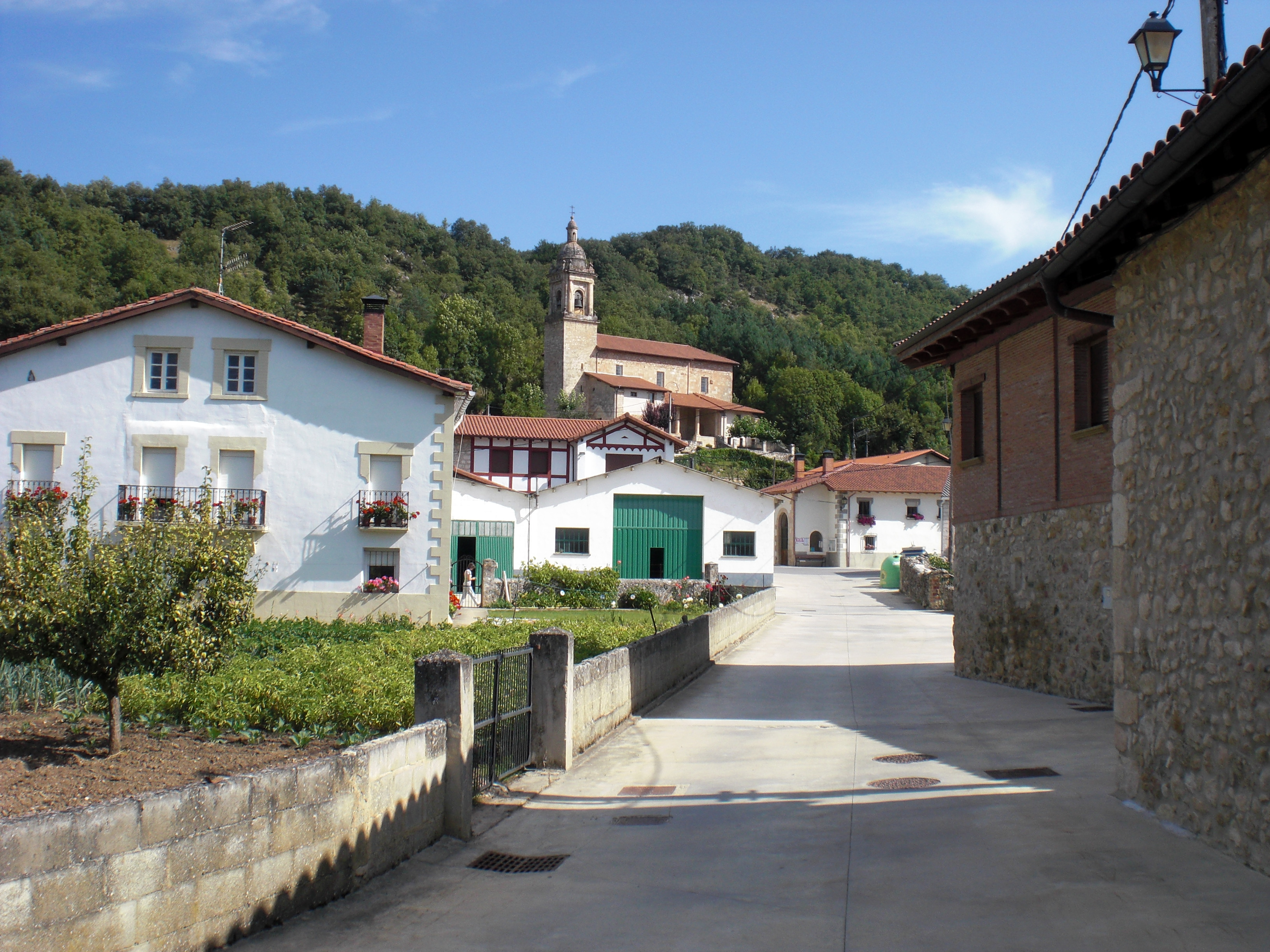 Birgara Goieneko ikuspegia